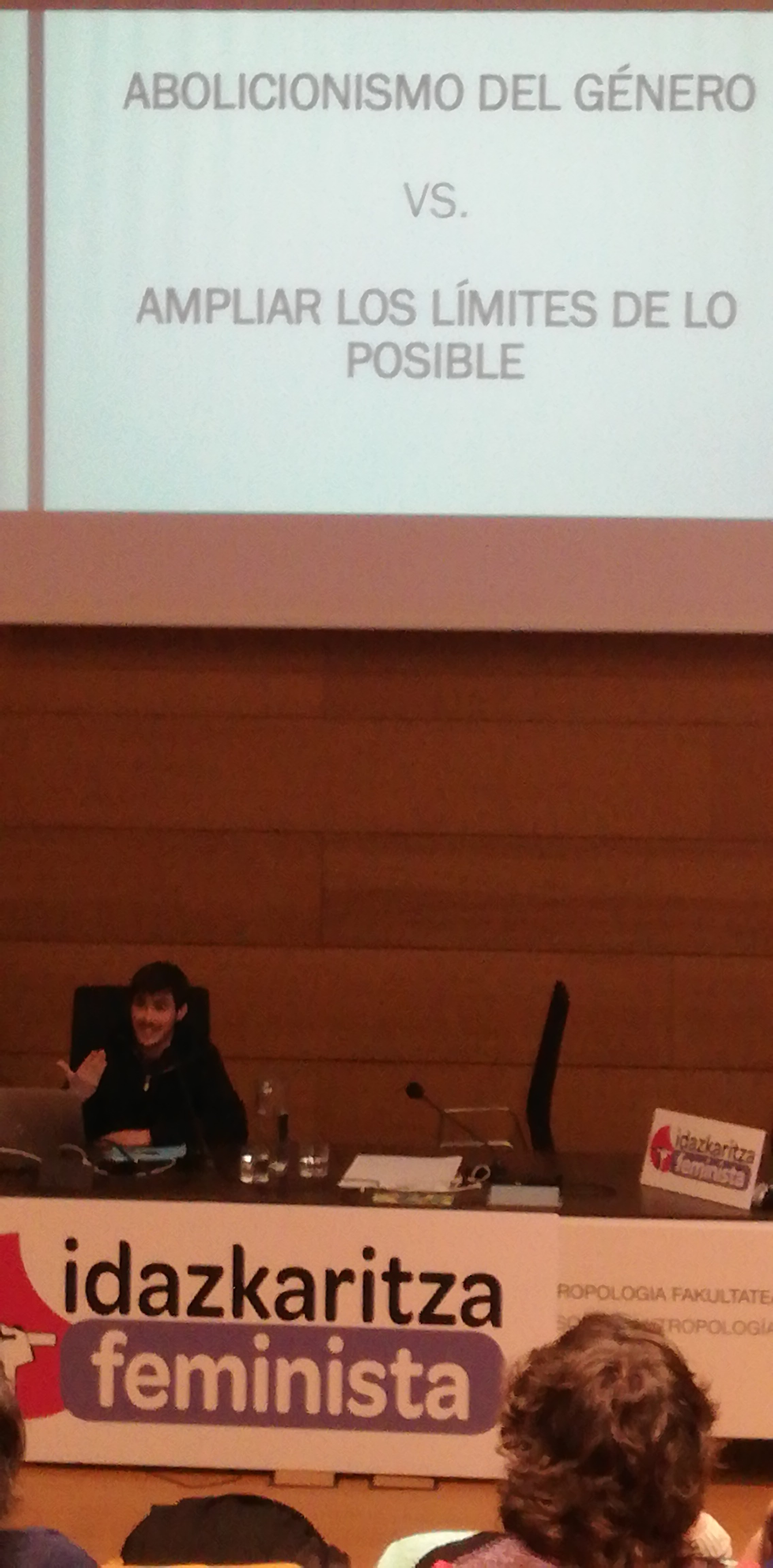 Miquel Missé soziologoak Pedagogia Feministaren erronka posible denaren mugak zabaltzean kokatzen du